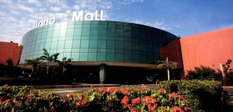 Acarigua